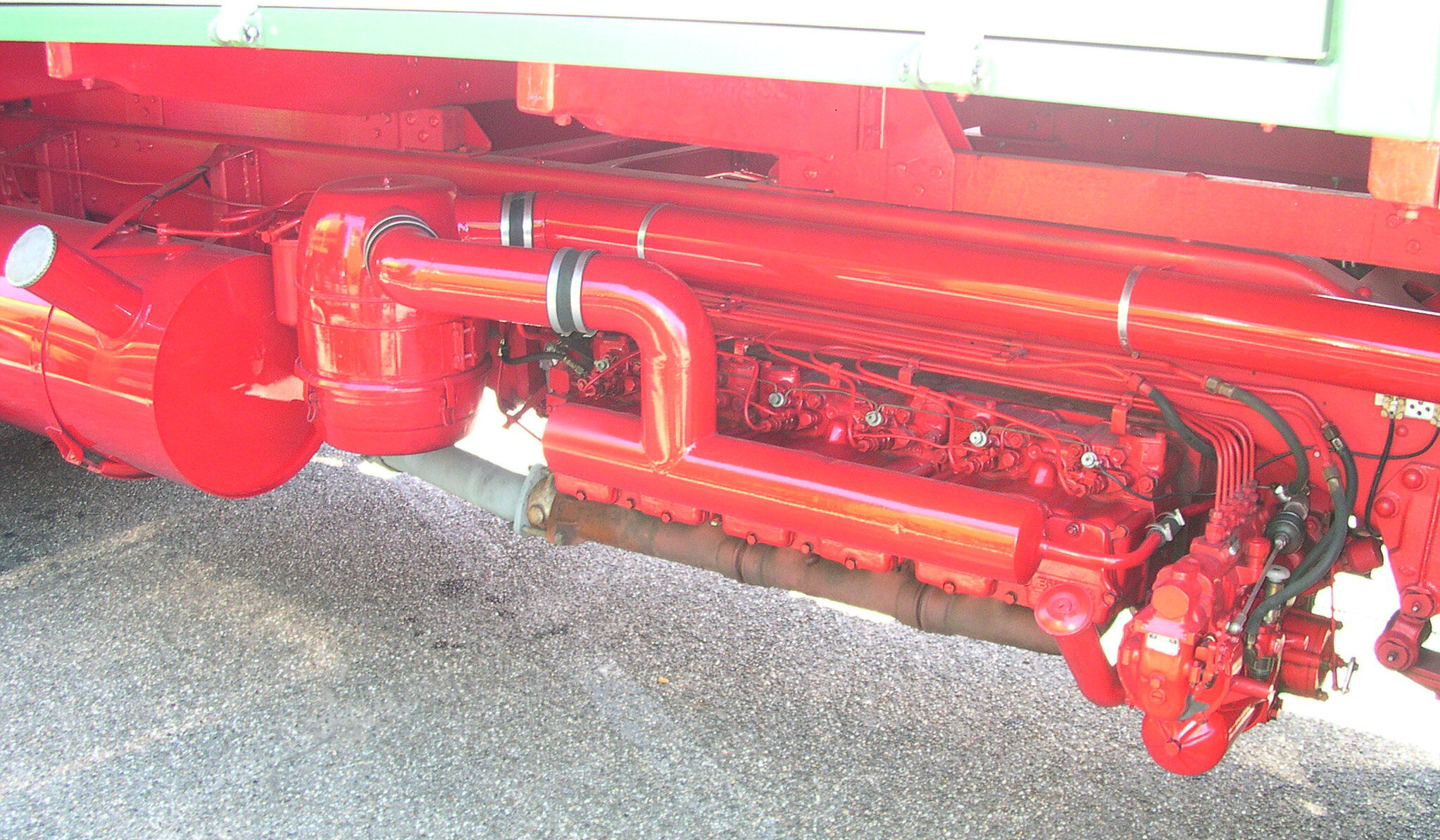 Wörth am Rhein, Oldtimer-Treffen bei Daimler-Chrysler Büssing LU 11, Baujahr 1961, Motor U11 mit 11000 ccm Hubraum, 141 kW (192 PS).